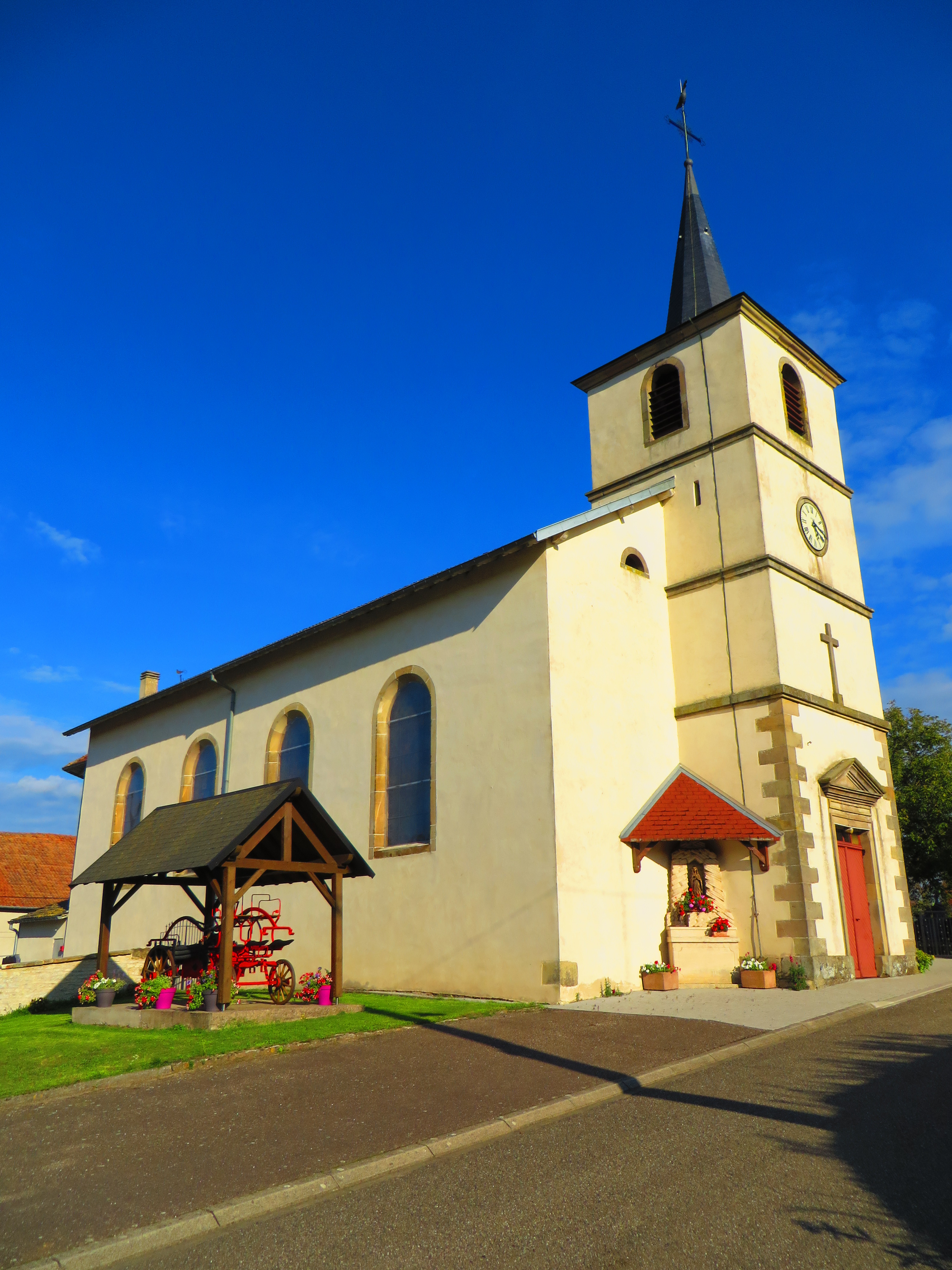 Insviller l'église Saint-Michel